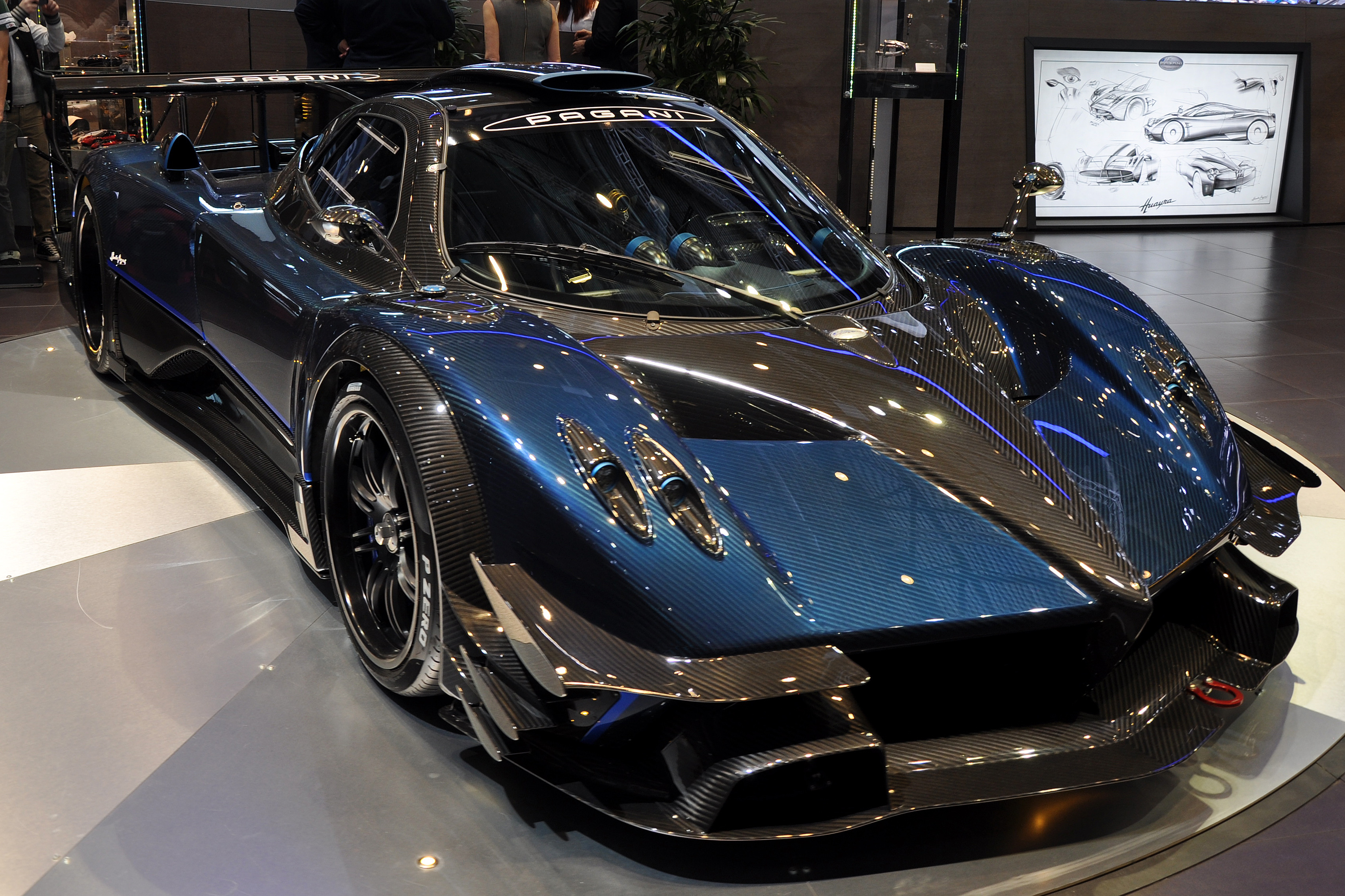 Pagani Zonda Revoluctiòn - Salone Internazionale dell'automobile di Ginevra 2014